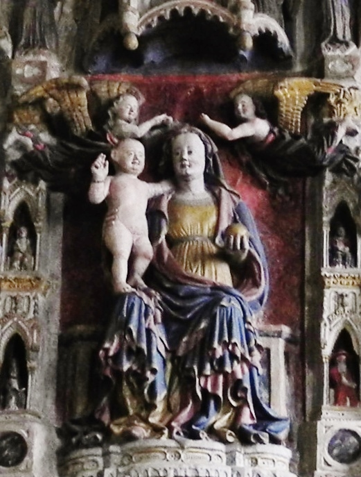 Madonna con il Bambino incoronata dagli Angeli Particolare dell'Ancona di San Clemente